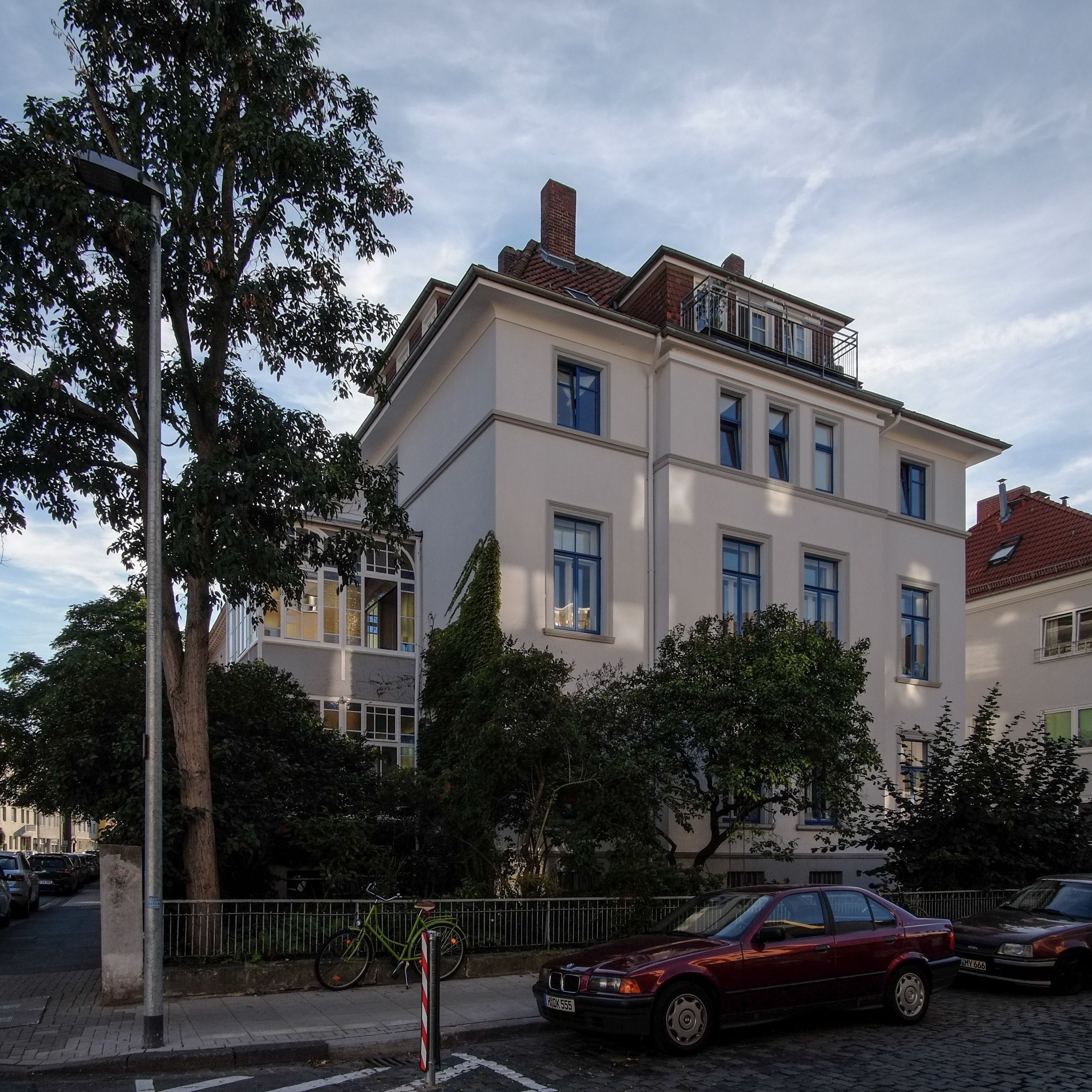 Baudenkmale Niedersachsen, Hannover, Lutherstraße 27